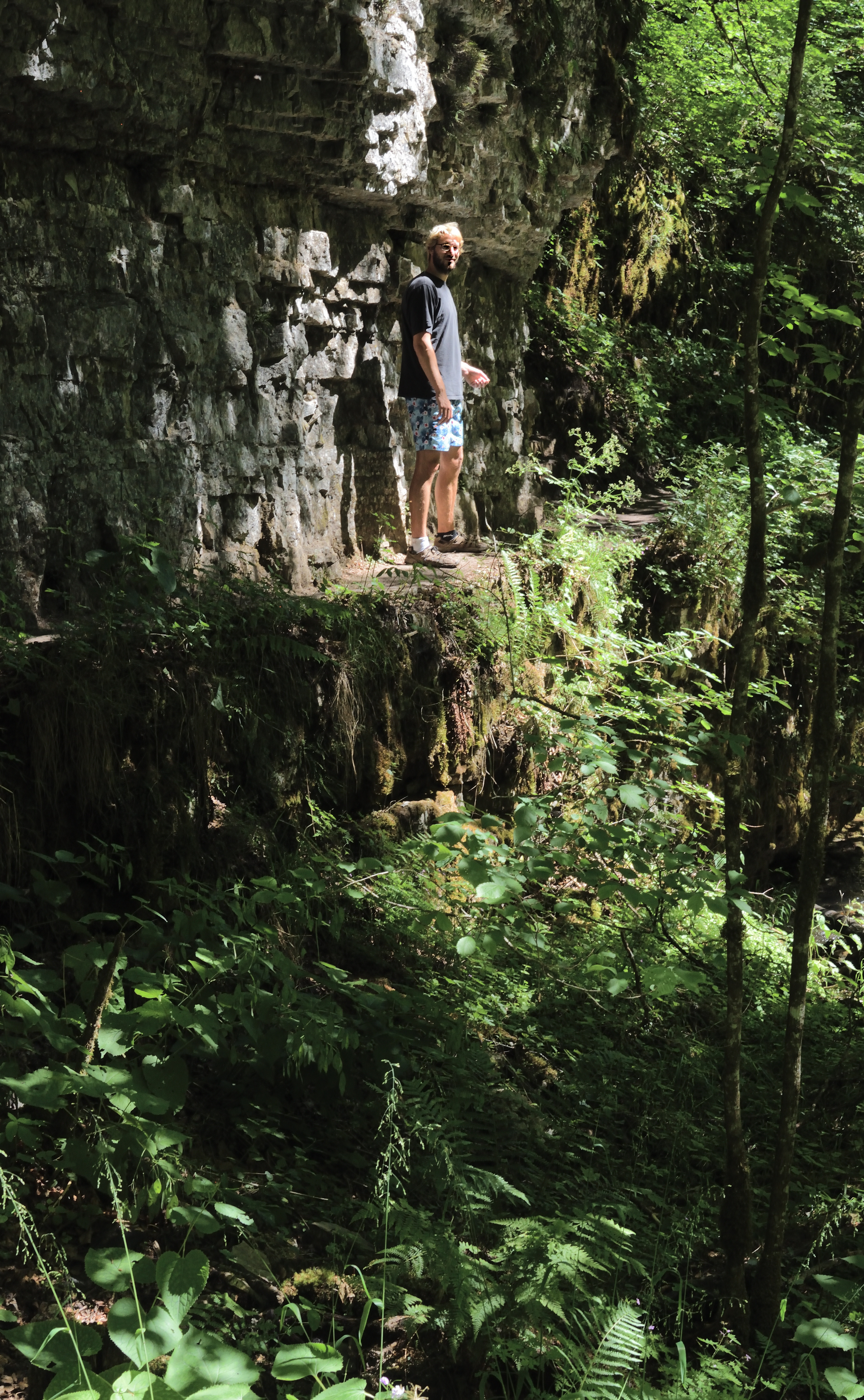 Saumpfad in der Gauchachschlucht